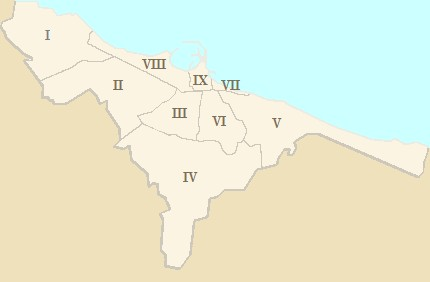 Suddivisione del territorio di Bari, Italia